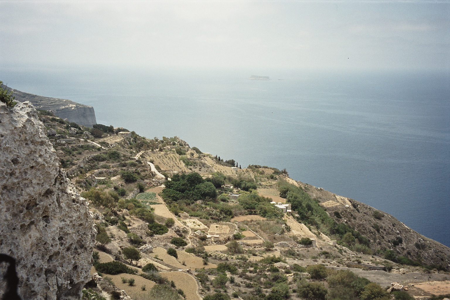 Dingli cliffs (Malta)